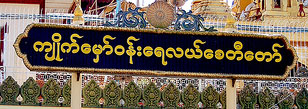 Pancarte indiquant le nom de la pagode "Kyaik hmaw won ye le" (Yangon)